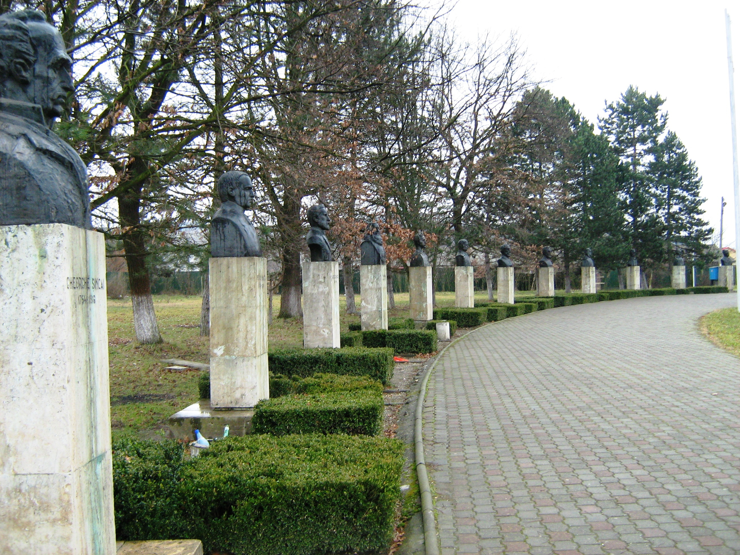 Câmpul Libertăţii